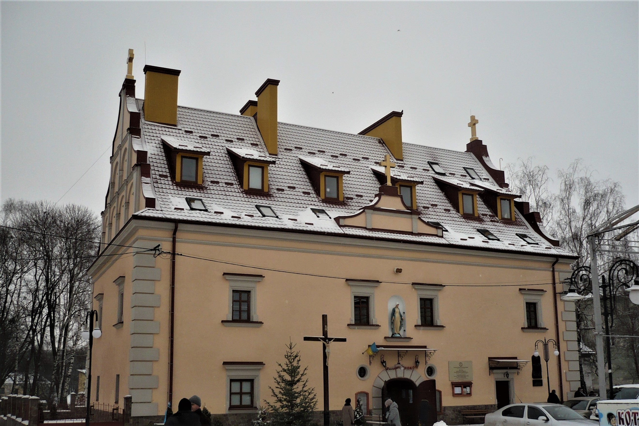 Cerkiew